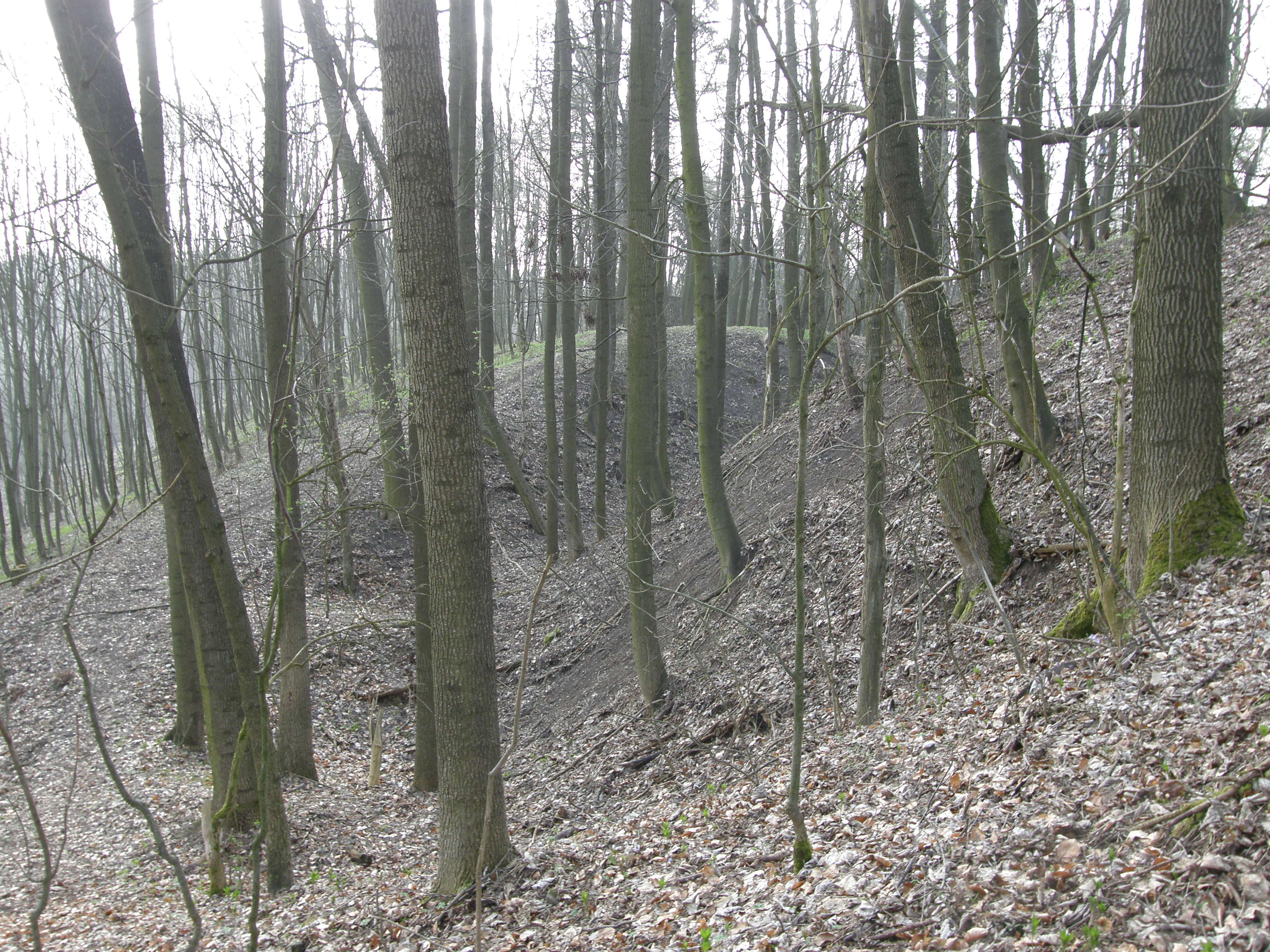 Hrad - hrádek Vražba, zbytky hradu Rotemberk, tvrziště Habřina, archeologické stopy (Habřina), na návrší nad potokem, Habřina